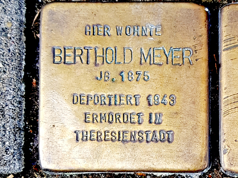 Stolperstein für Berthold Meyer, Jg. 1875, deportiert 1943, ermordet im KZ Theresienstadt